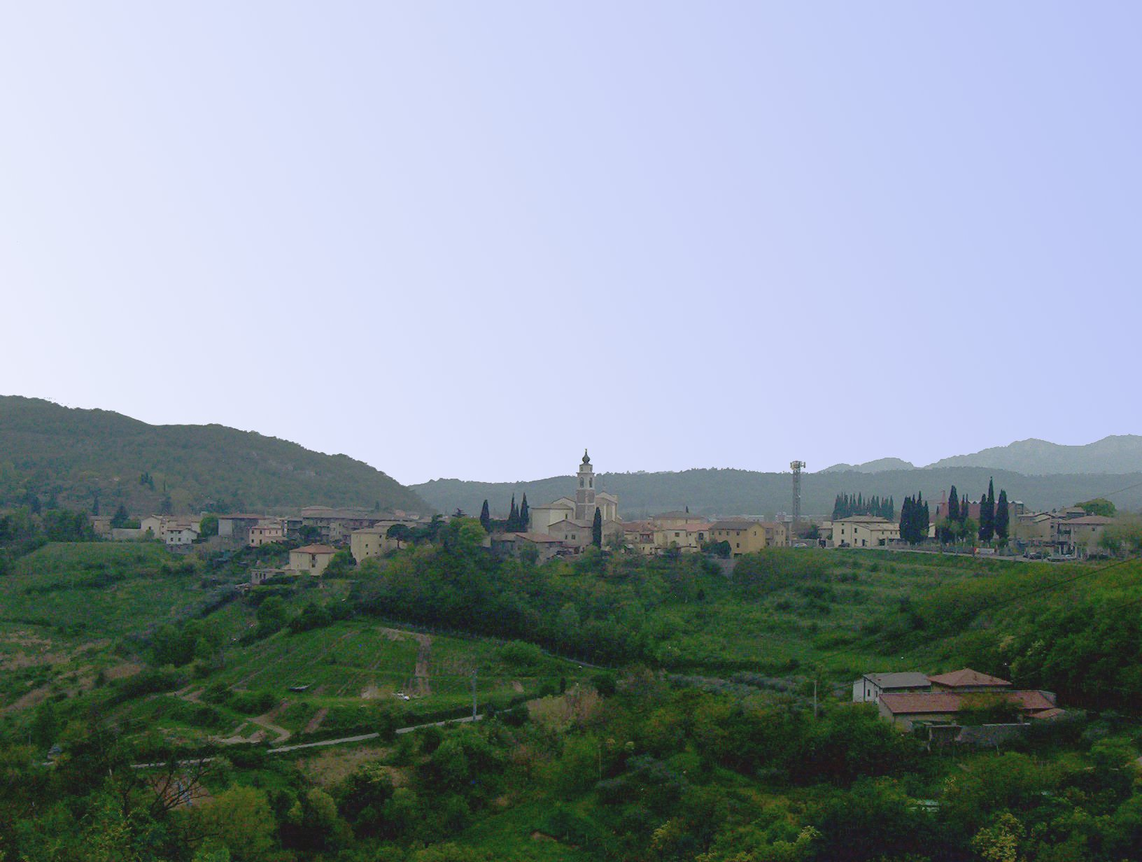 Panorama di Rivoli Veronese